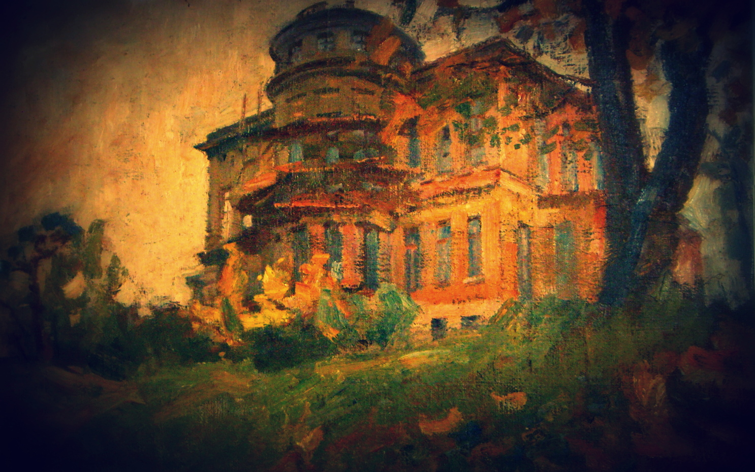 Богородицкий Дворец . Автор П.А. Кобяков